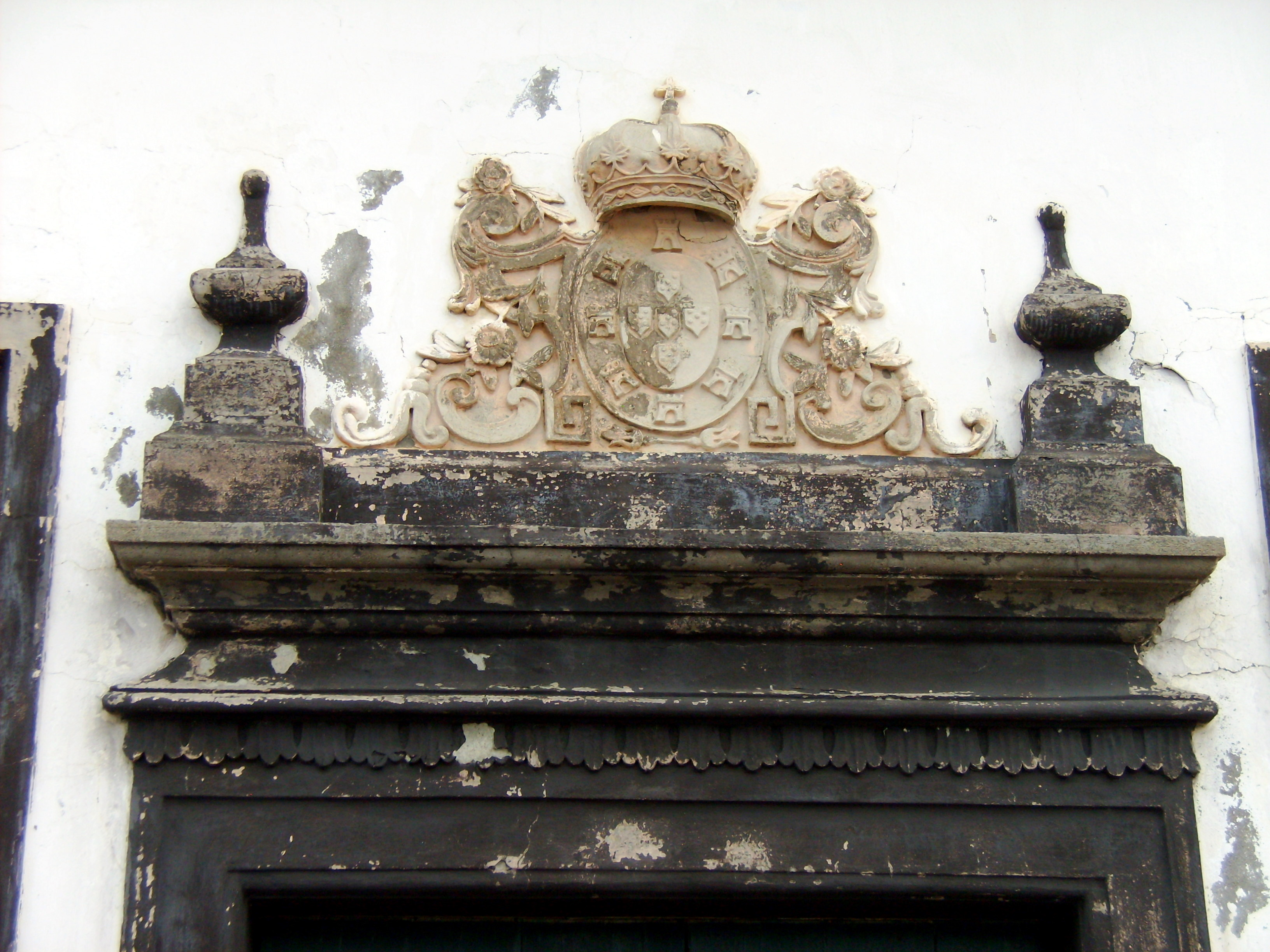 Ermida da Boa Nova, Angra do Heroísmo, Ilha Terceira, Açores: brasão de armas sobre a portada.